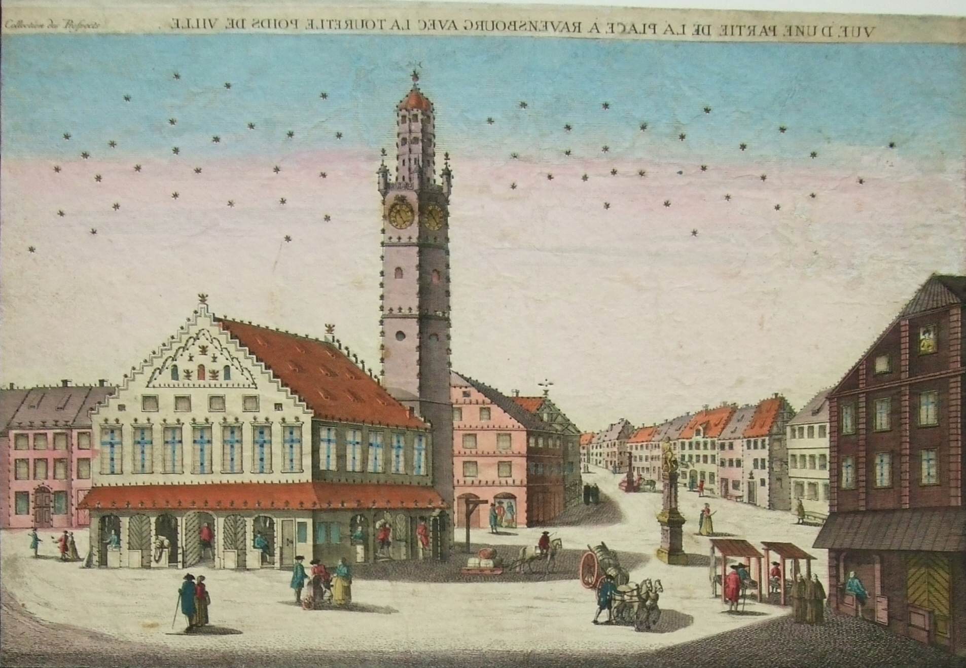 Vue de une partie de la place a Ravensbourg avec la touretle poids de ville, Guckkastenbild mit Blaserturm und Waaghaus am heutigen Marienplatz in Ravensburg; 40,8 x 28,4 cm, Augsburg um 1770 (Schefold 6266)